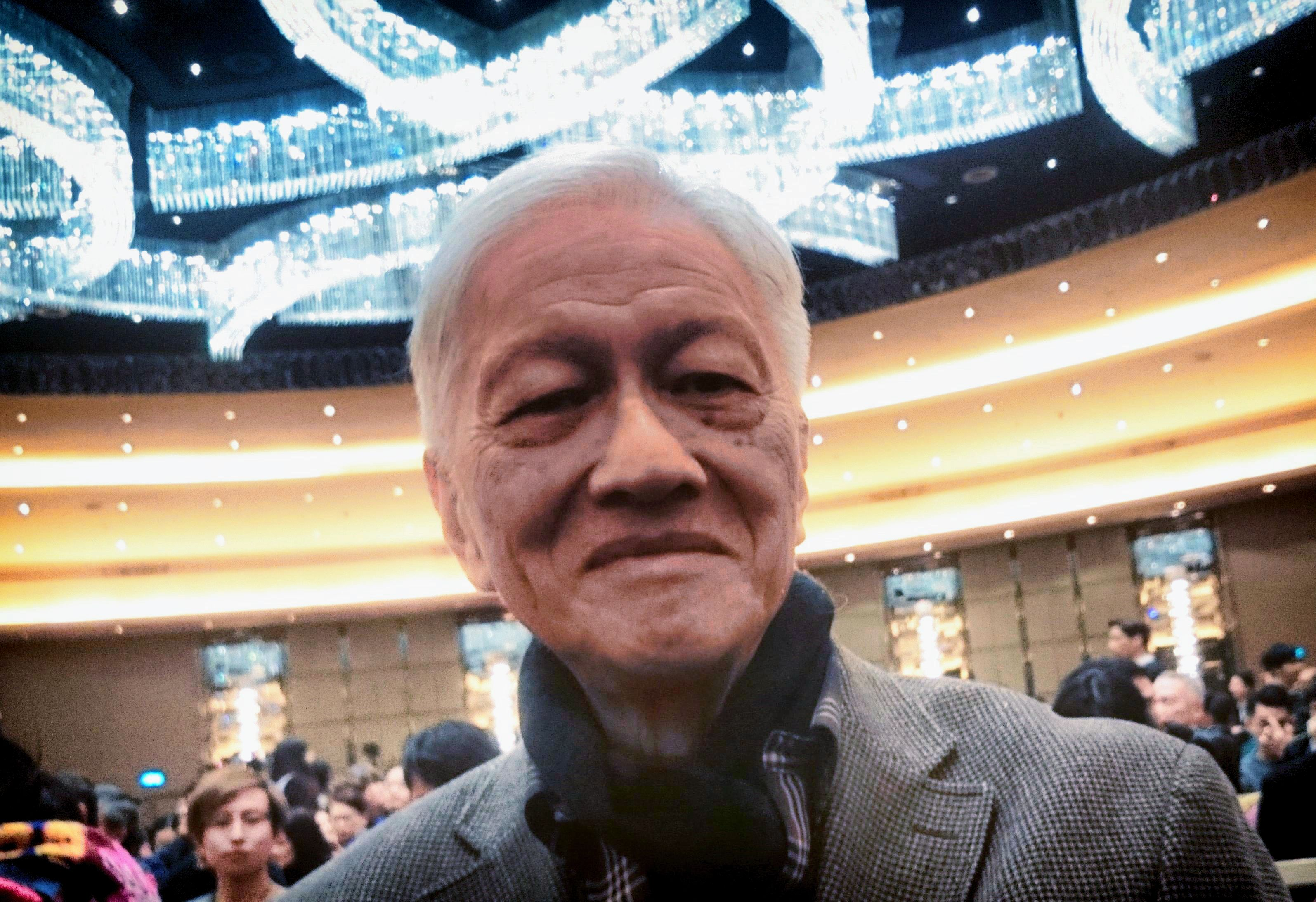 粵語: 2019年2月10號夜晚，李秉堯喺九龍灣國際展貿中心度。